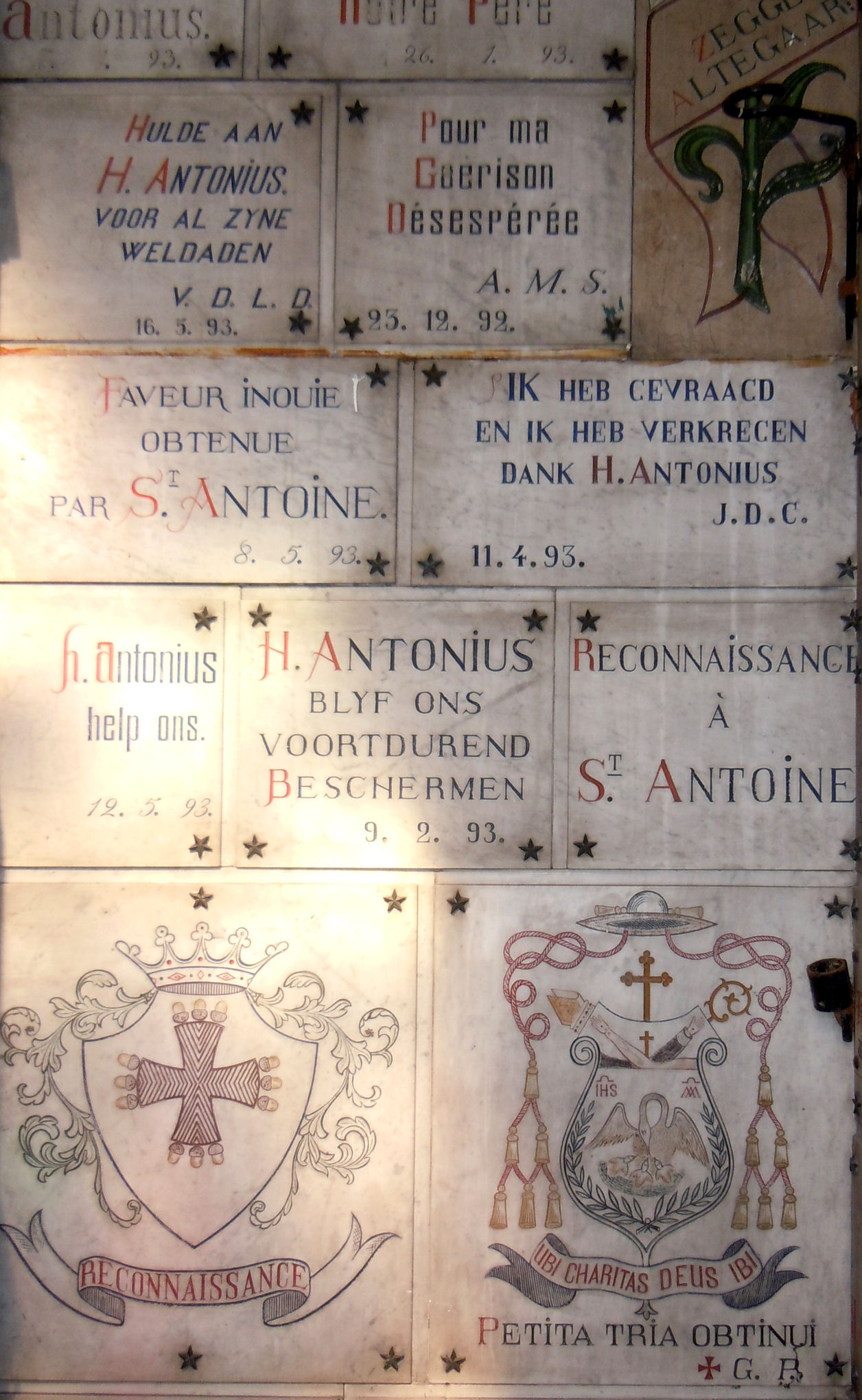 exvoto